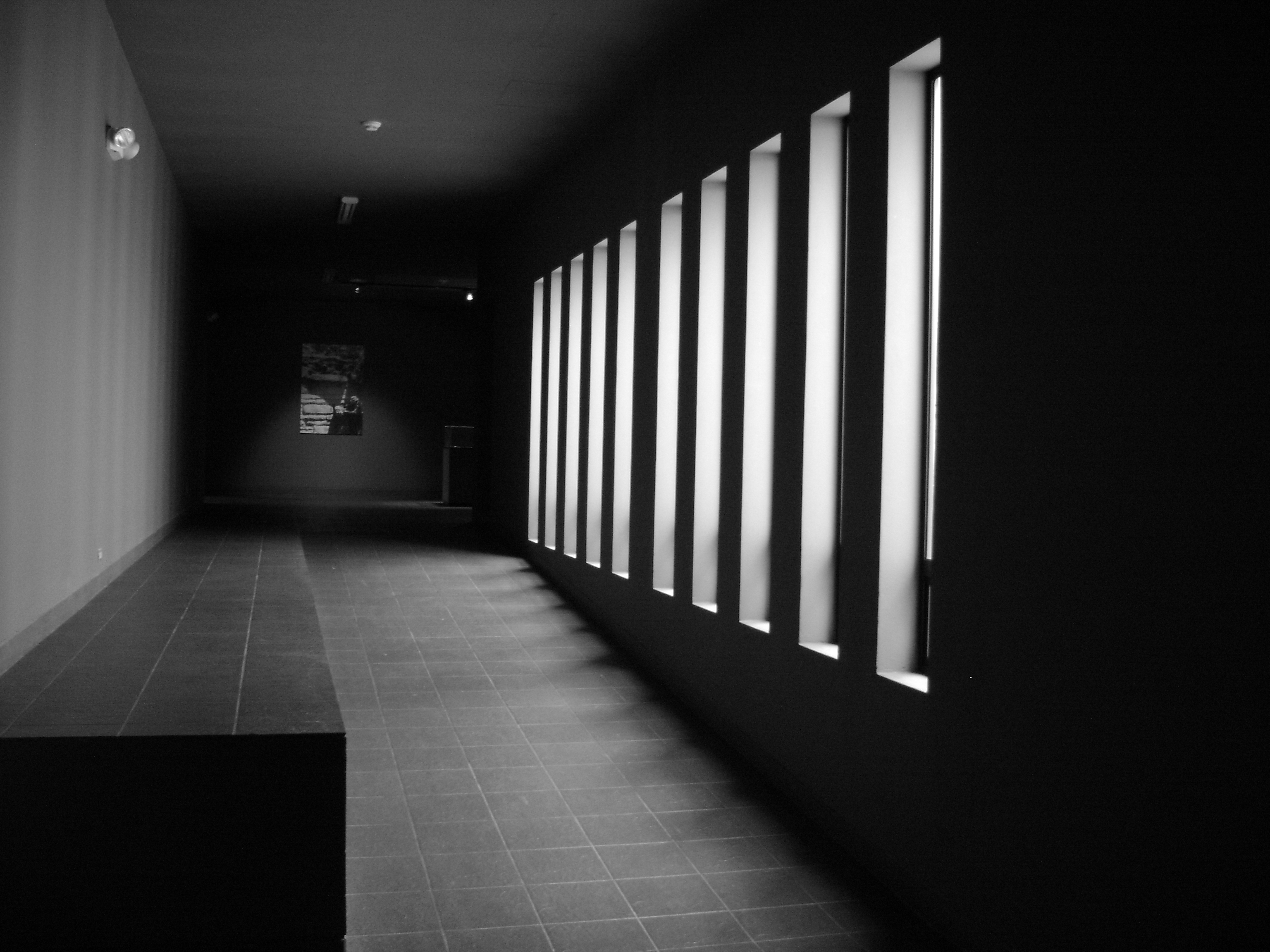 Vista interior del museo.